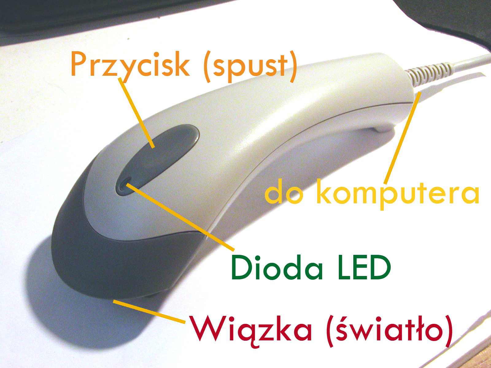 Flow chart of CCD Barcode Scanner. Schemat działania czytnika kodów kreskowych.